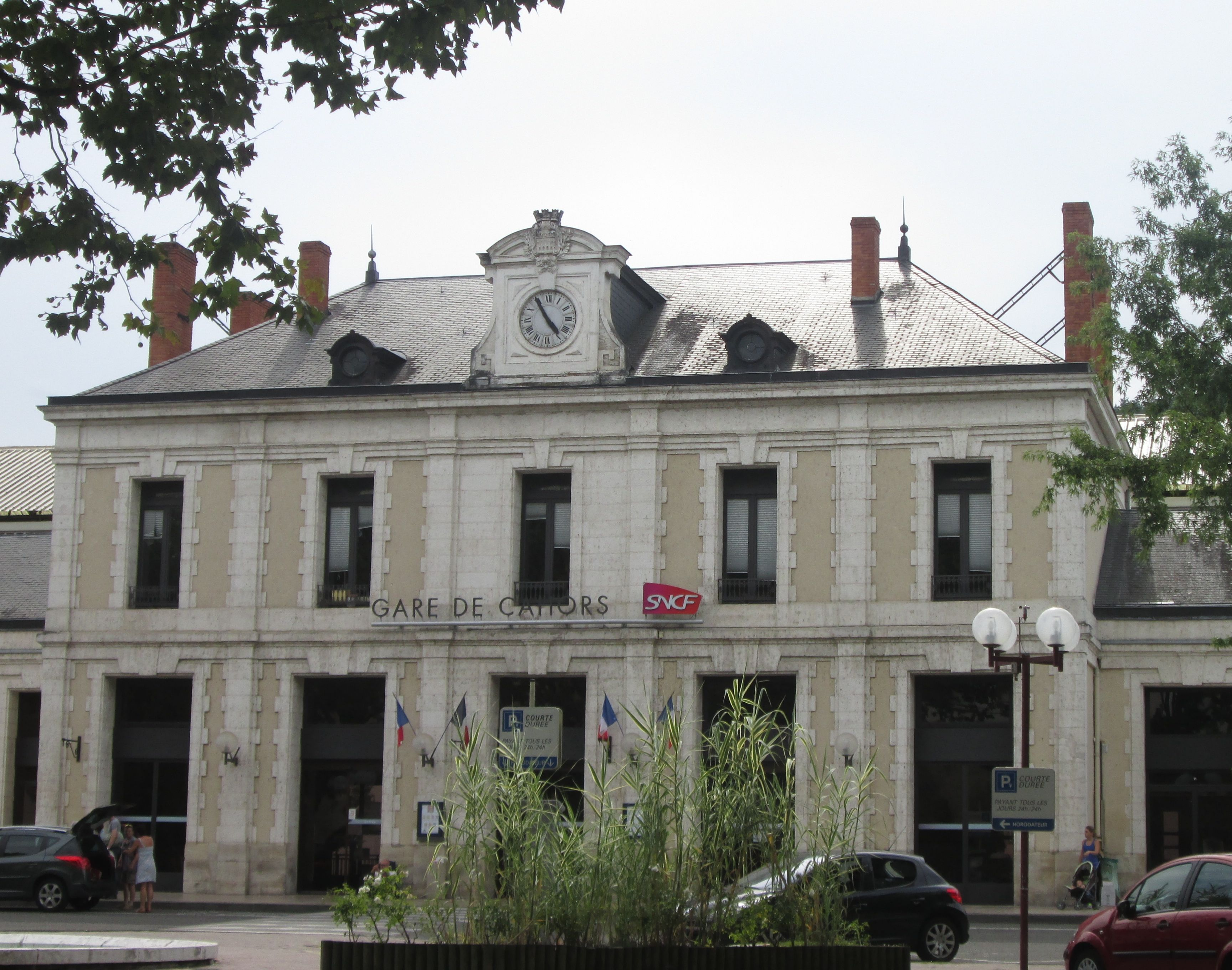 Gare de Cahors